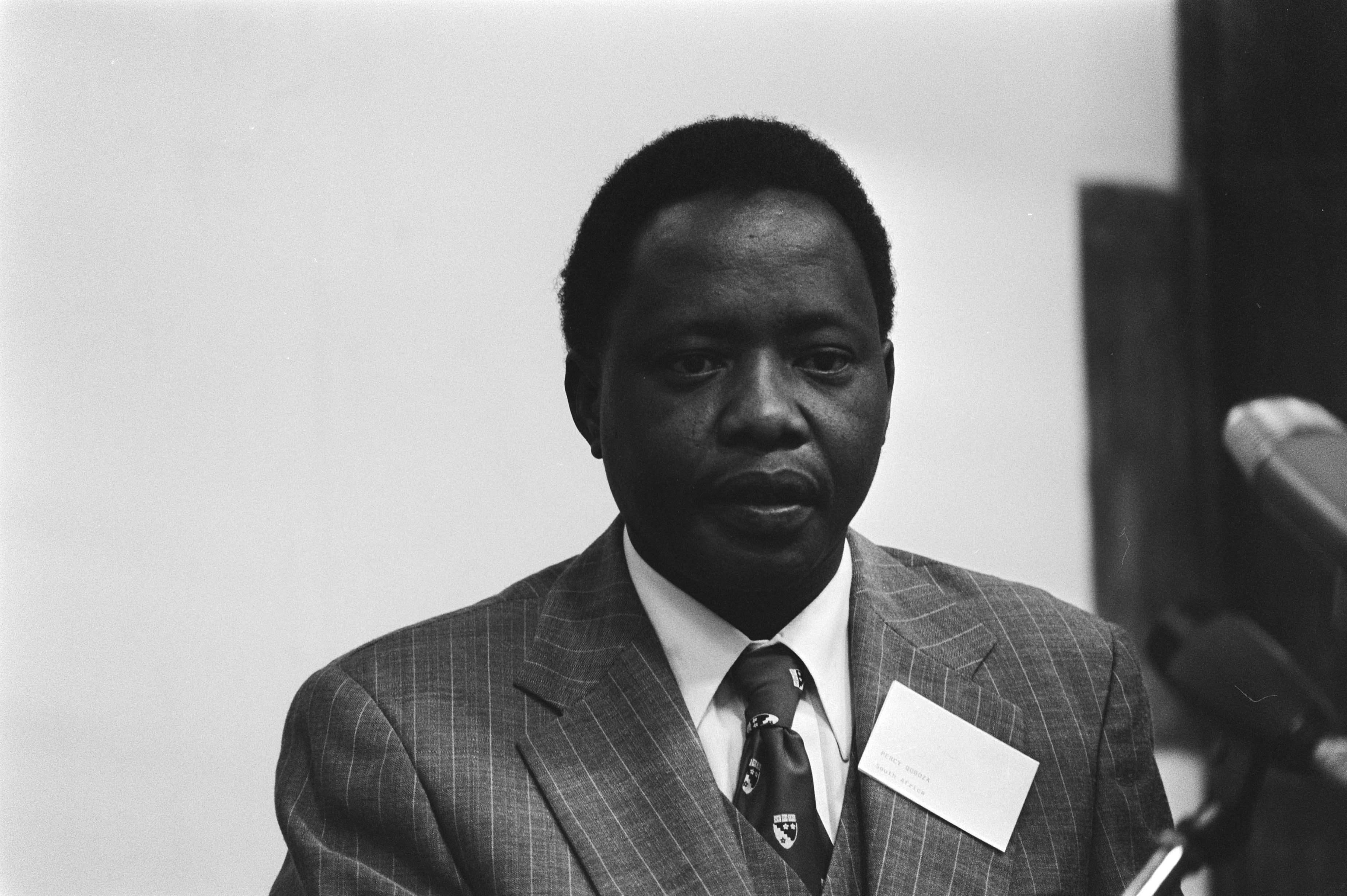 Collectie / Archief : Fotocollectie Anefo Reportage / Serie : [ onbekend ] Beschrijving : Prins Claus opent 31e congres van de FIEJ; Percy Qobono (kop) Datum : 23 mei 1978 Trefwoorden : congressen, openingen Persoonsnaam : Claus, prins, Fiej Fotograaf : Verhoeff, Bert / Anefo Auteursrechthebbende : Nationaal Archief Materiaalsoort : Negatief (zwart/wit) Nummer archiefinventaris : bekijk toegang 2.24.01.05 Bestanddeelnummer : 929-7355 Reacties Geplaatst door Tekstman op 19 september 2014 - 22:39. De juiste naam is Percy Qoboza.